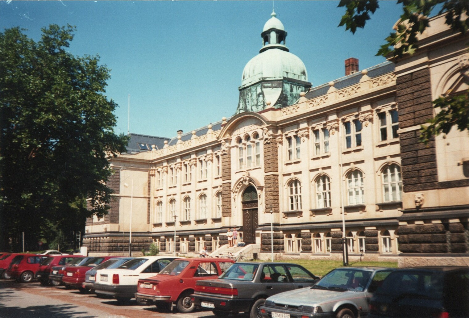 Das ehemalige Hauptgebäude der Ingenieurhochschule Zwickau im Jahr 1992. Heute ist dort das Zwickauer Finanzamt untergebracht.